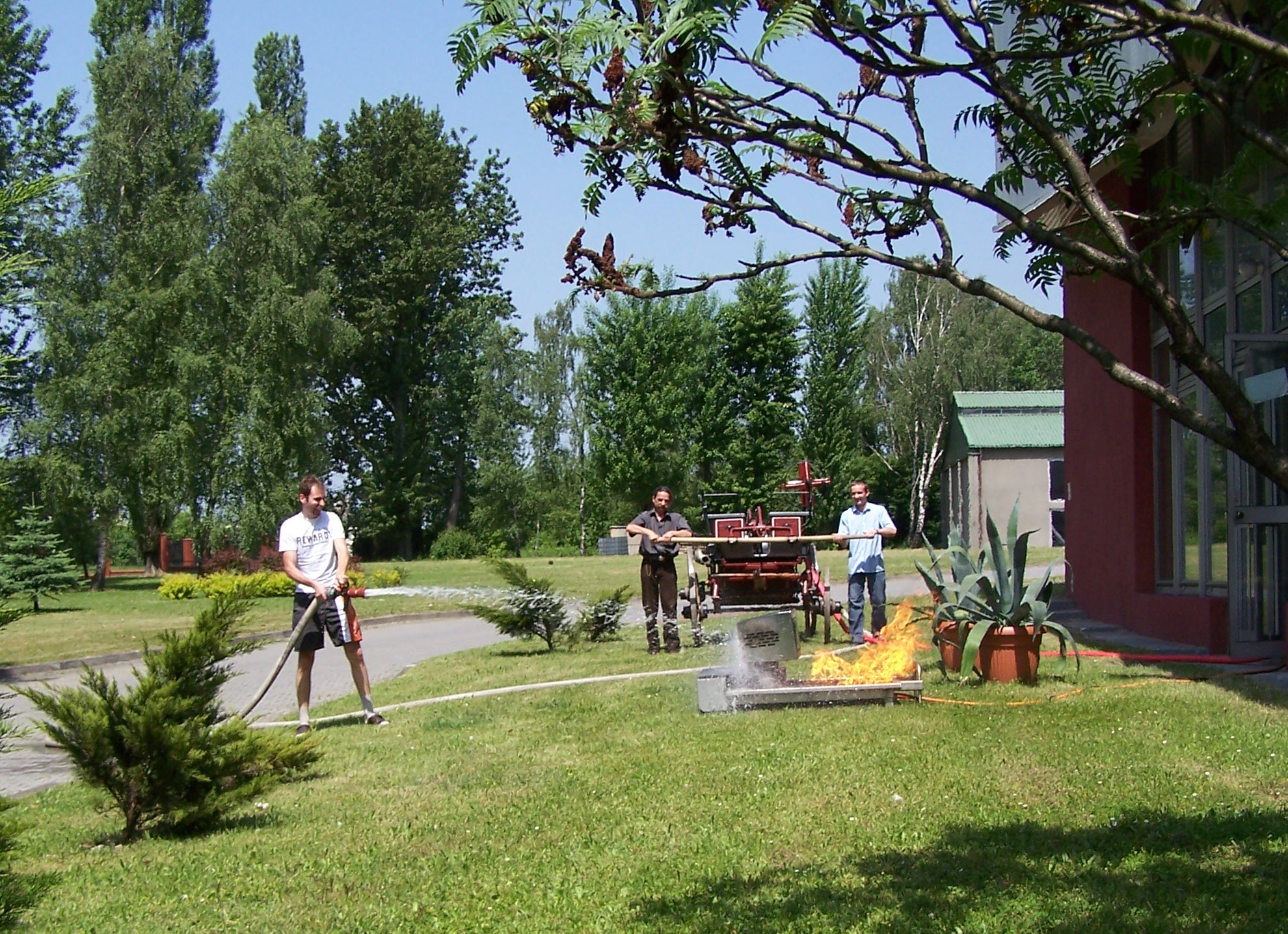 Industriada – Centralne Muzeum Pożarnictwa w Mysłowicach